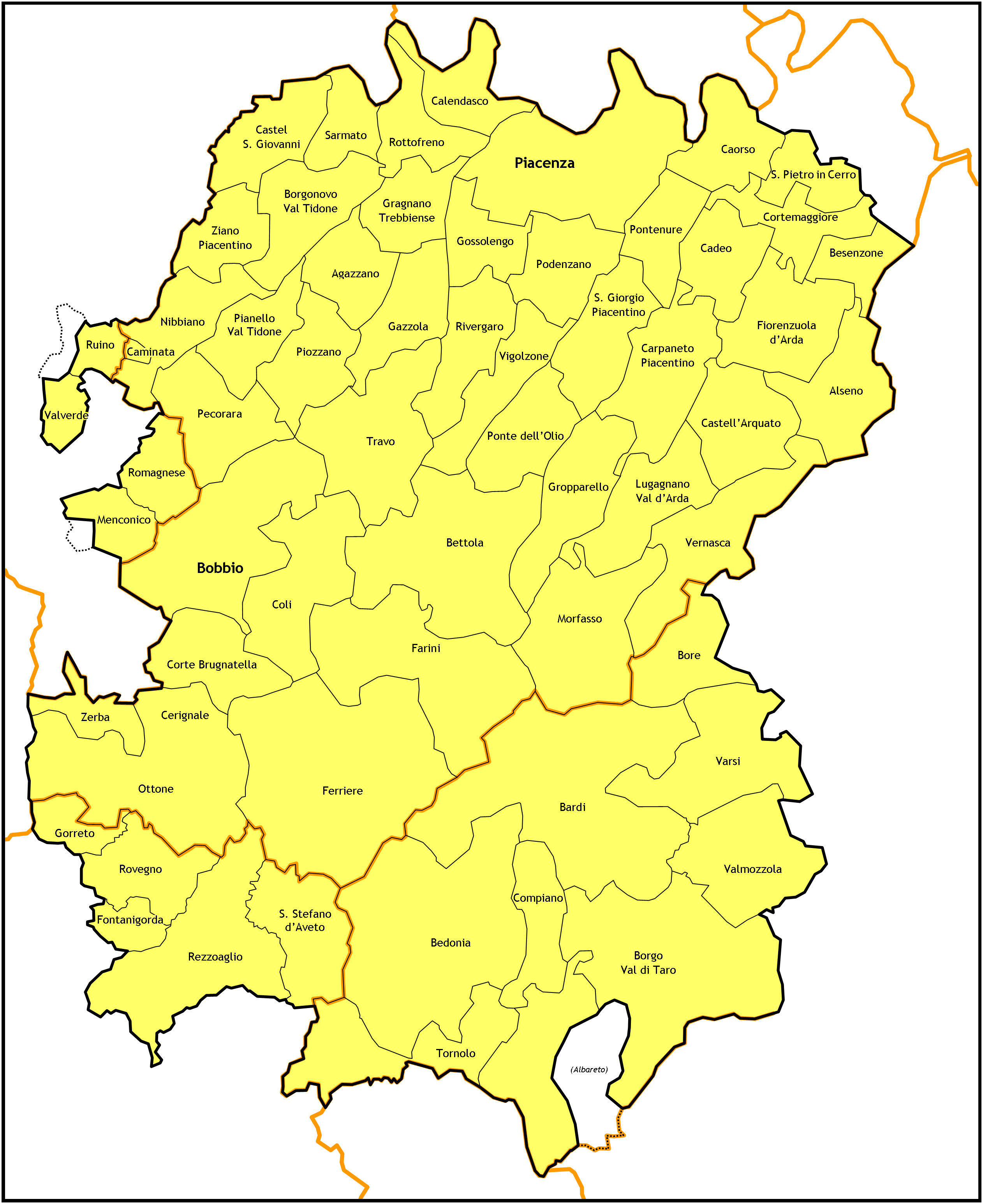 Mappa della Diocesi di Piacenza-Bobbio